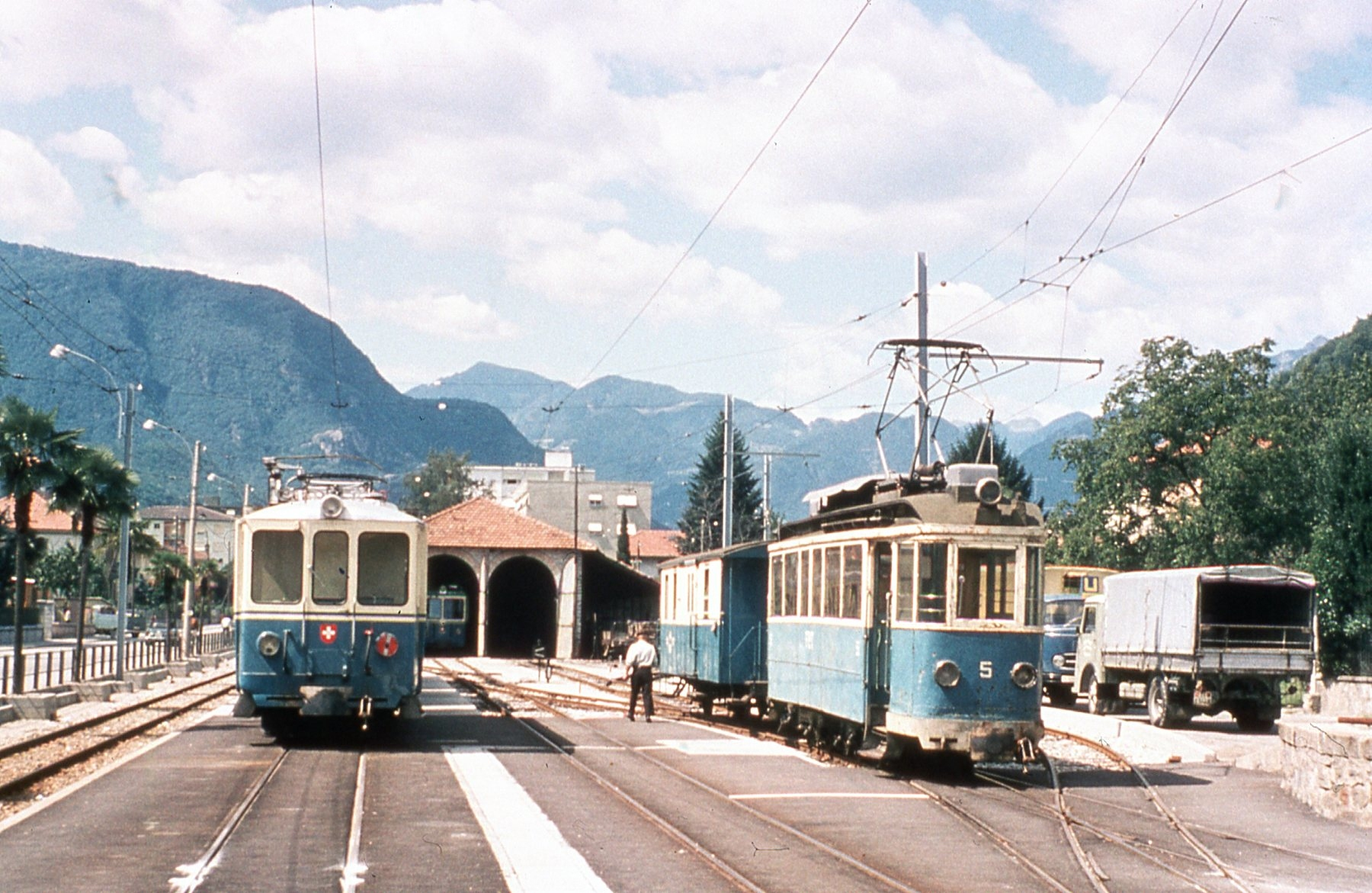 FART ABDe 4/4 1 and Be 2/4 5 at Locarno S. Antonio train station. Photo. François Chapuis . La construction de la ligne des Centovalli à commencé en 1912, elle c'est terminée en 1923 à voie métrique, sa longueur et de 52 Kilomètres, soit 20 Kilomètres sur Suisse et 32 Kilomètres sur l'Italie, cette ligne enjambe 83 ponts et traverse 31 tunnels. Motrice 1 et tram 5 Il y a d'autres photos du train des Centovalli dans mes albums en page 4